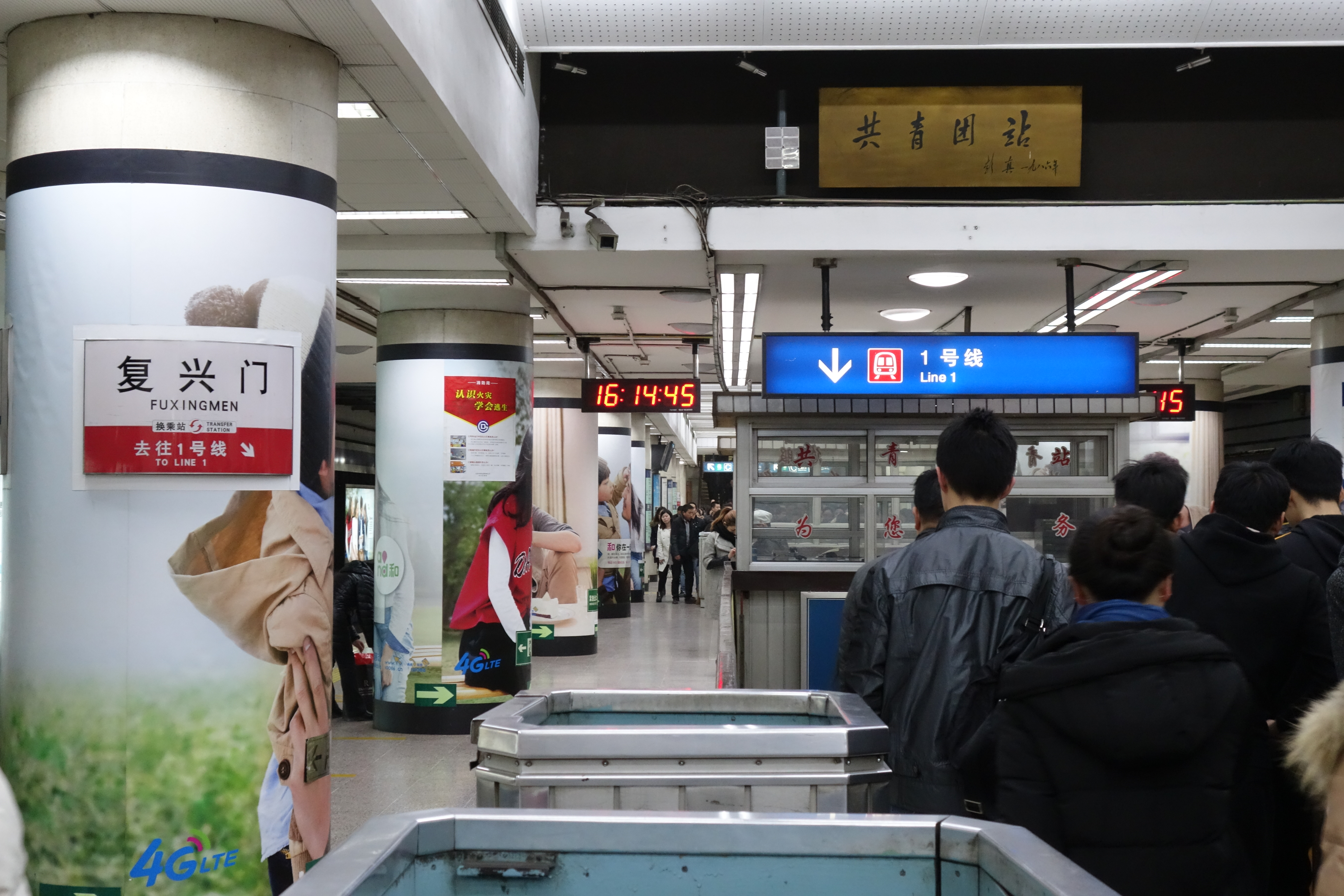 北京地铁2号线复兴门站内